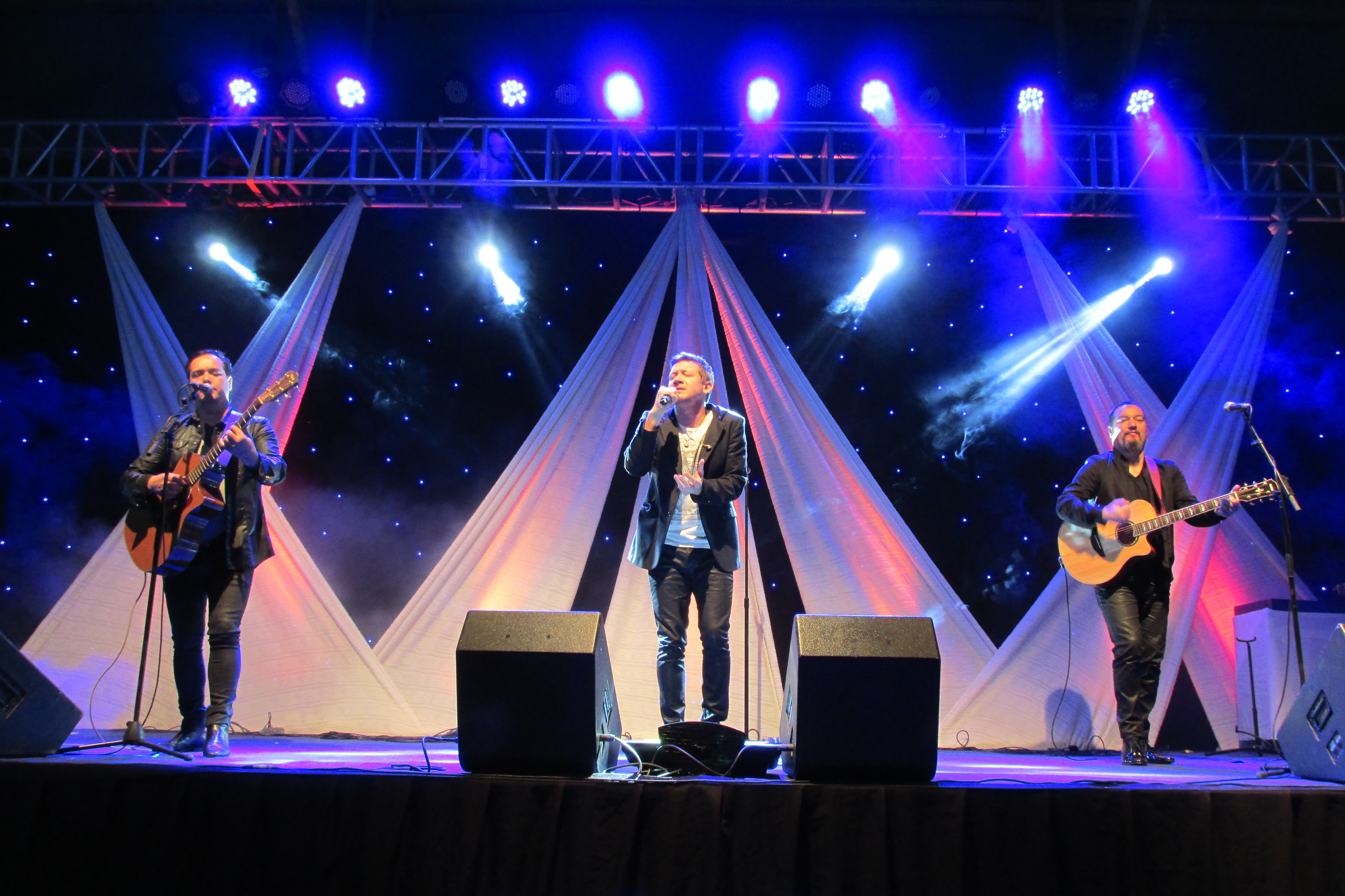 Grupo de Balada y Pop Chileno